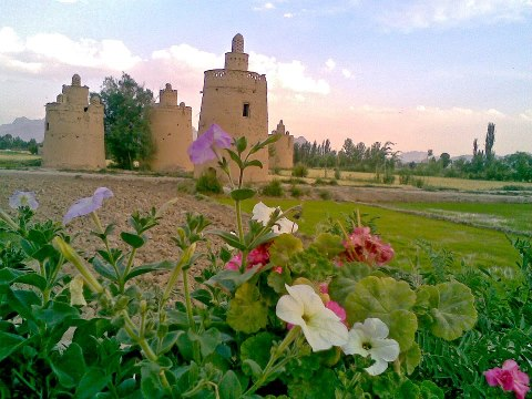 کبوتر خانه ولاشان از توابع شهر اصفهان